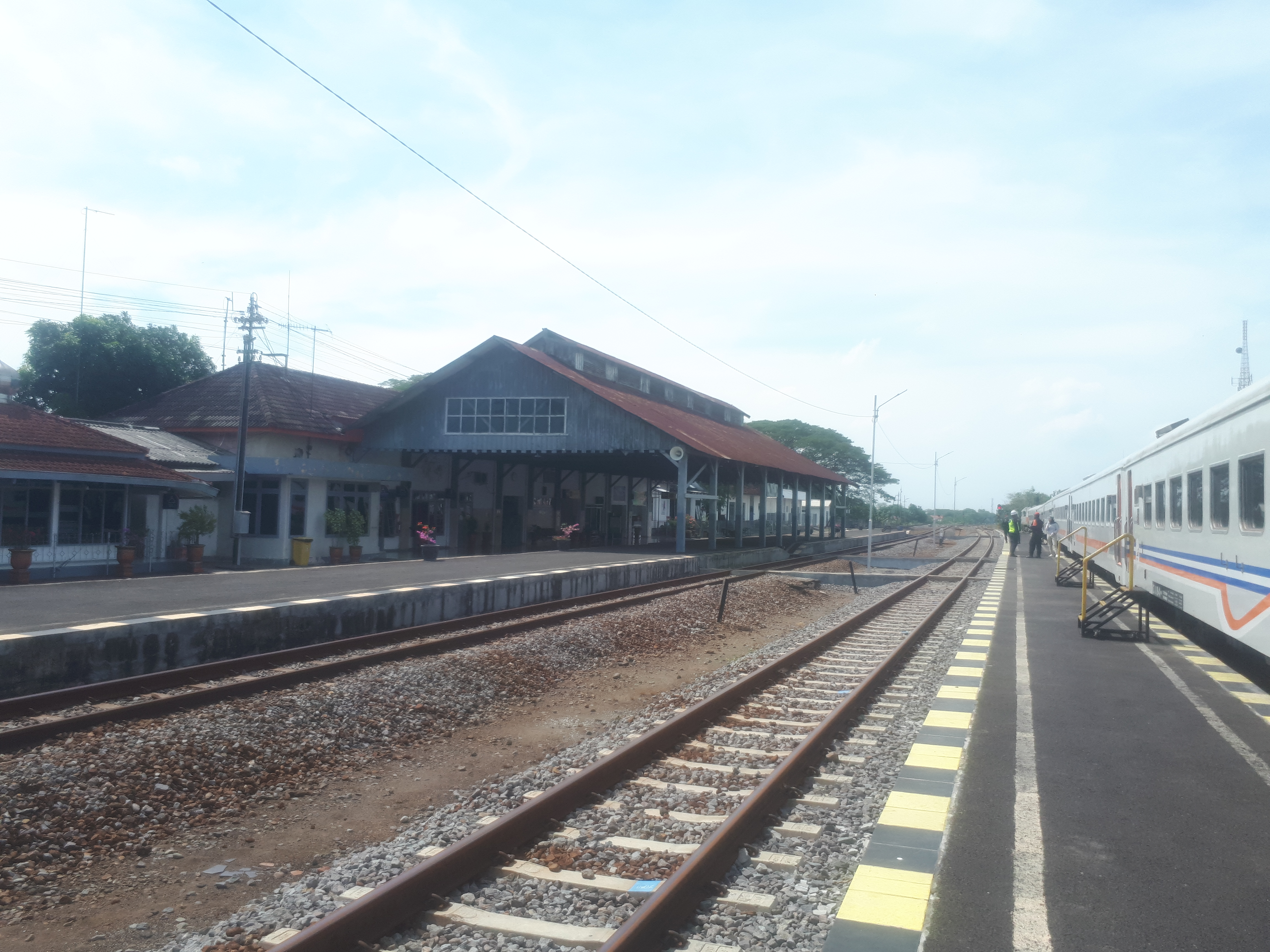 Peron Stasiun Nganjuk, 2020